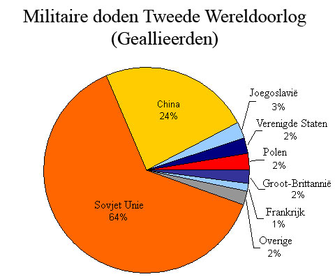 Procentueel overzicht van het aantal gedode geallieerde militairen gedurende de Tweede Wereldoorlog.